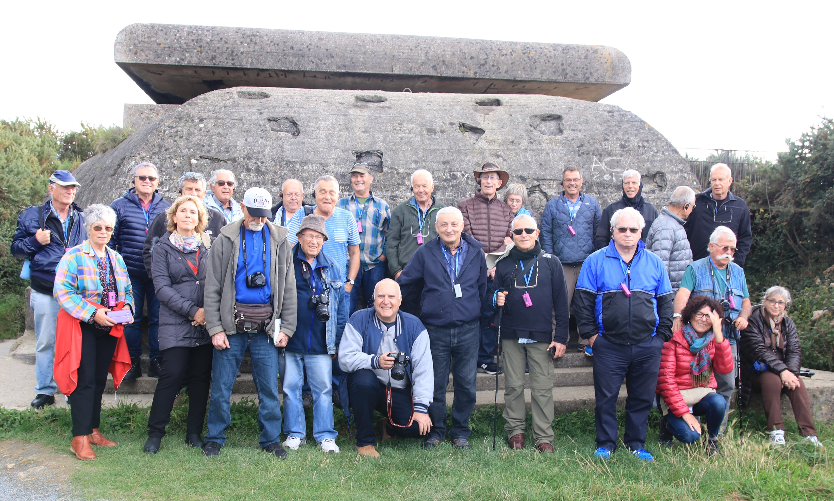 2015 סיור העמותה באזור הנחיתה בנורמנדי